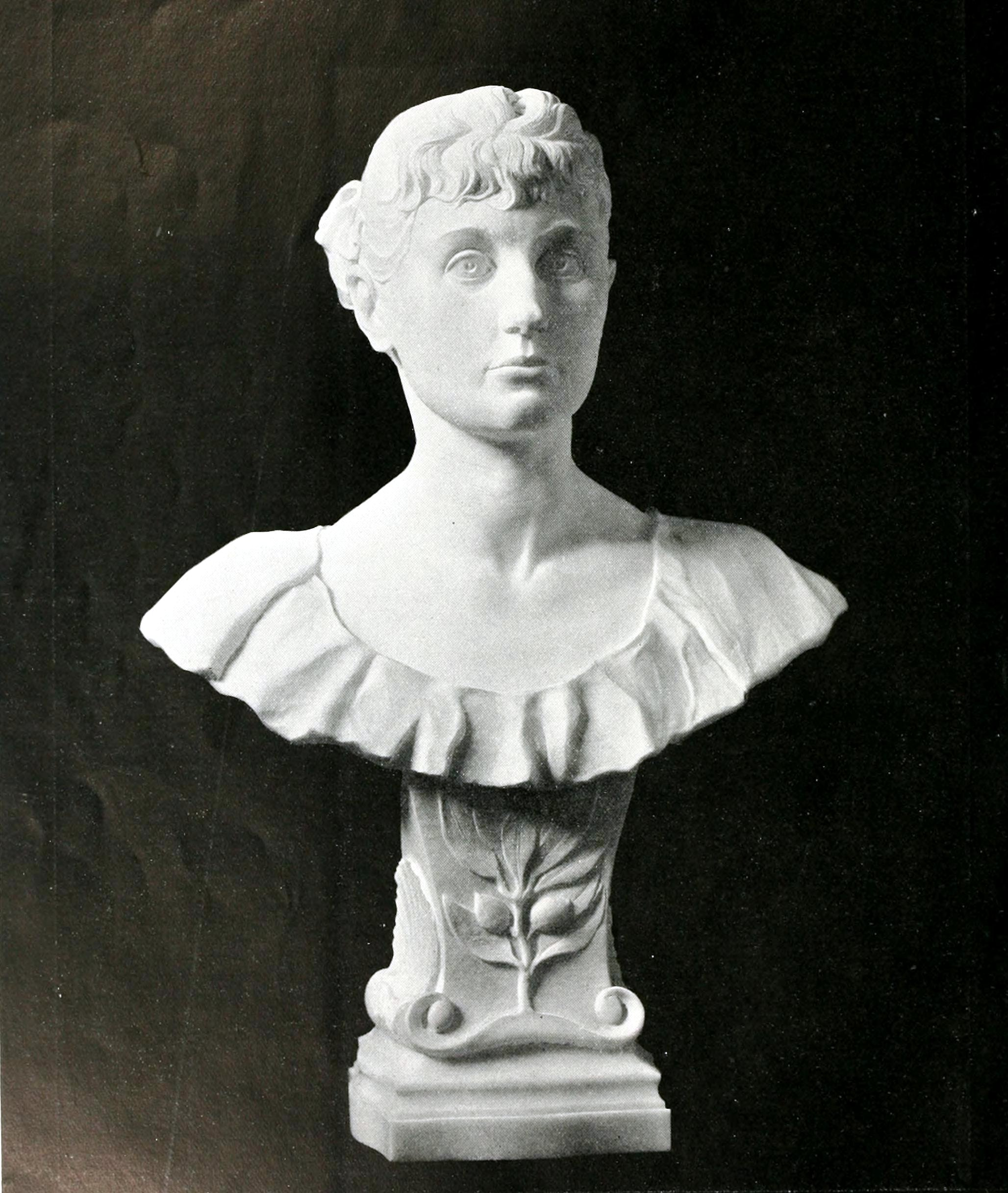 Buste de Mrs Hugh Wells Armstead, marbre